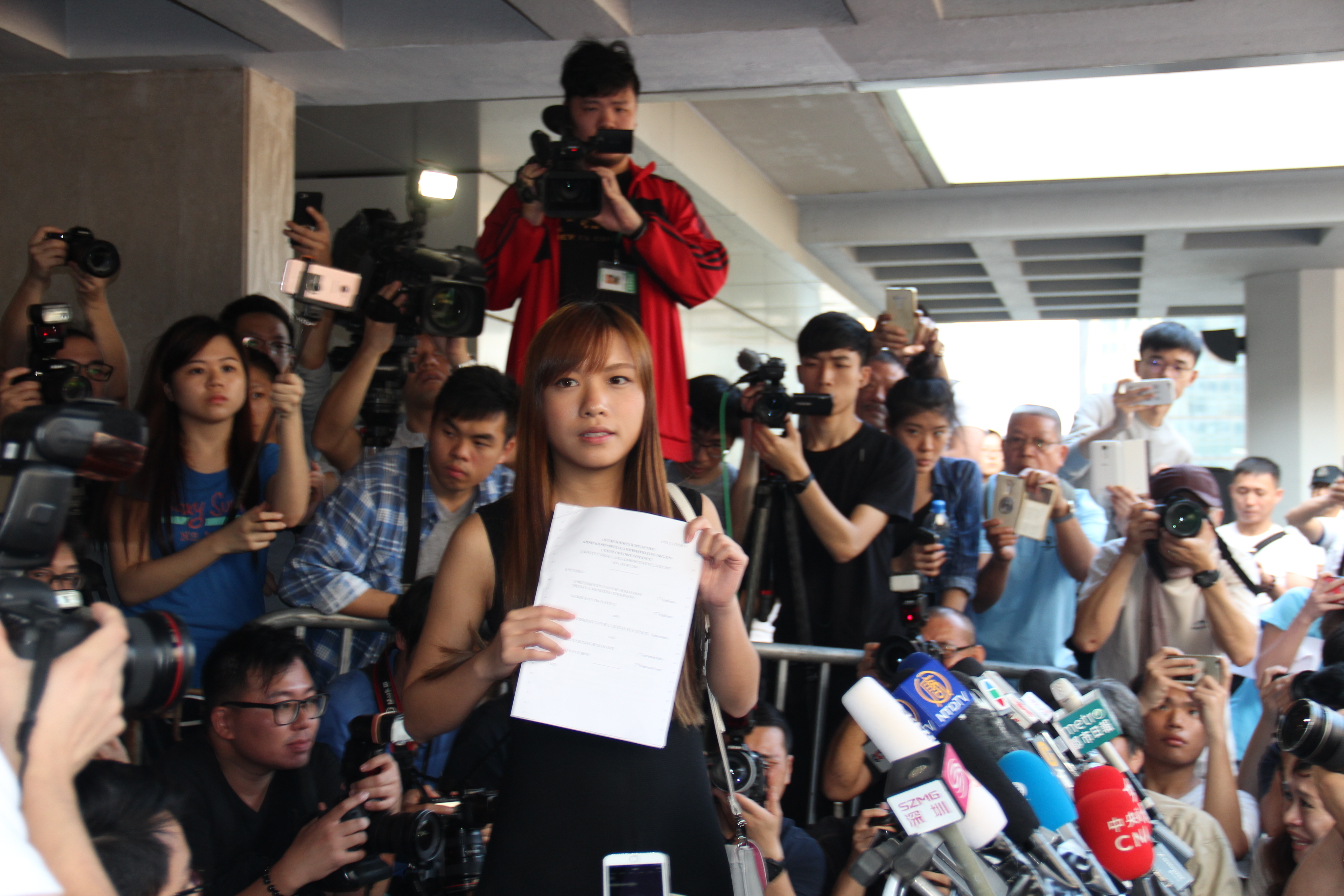 香港高等法院法官11月15日下午裁決